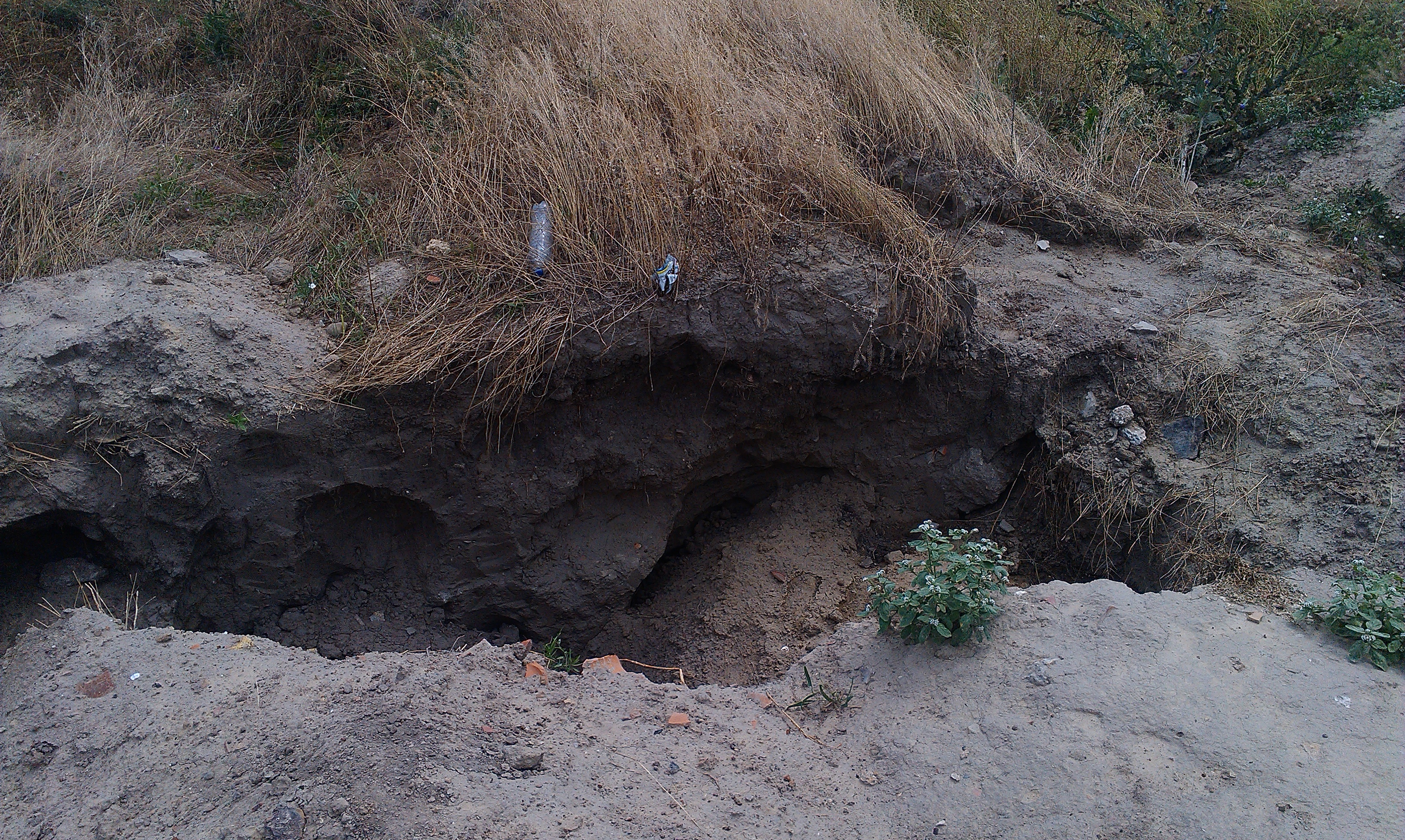 Ось такі "розкопки", яких тут багато.